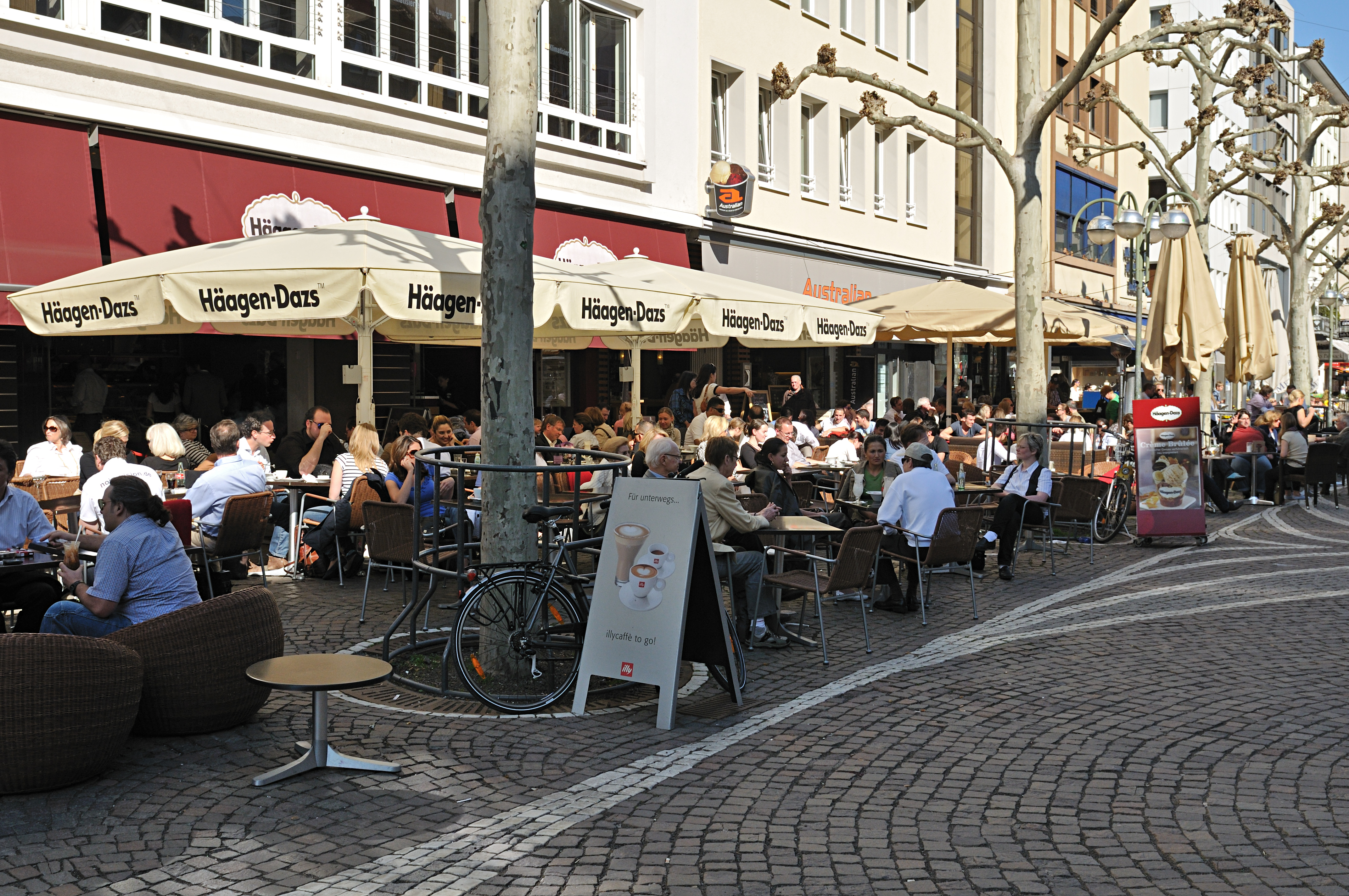 Straßencafes in der Großen Bockenheimer Straße (Freßgass) in Frankfurt am Main, April 2011